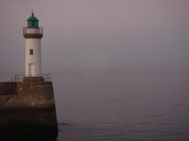 Phare tribord du port de Palais (56) un jour de brume